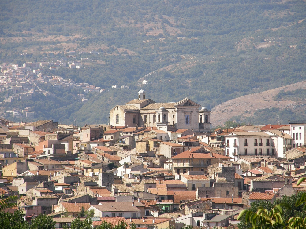 Paratola Peligna